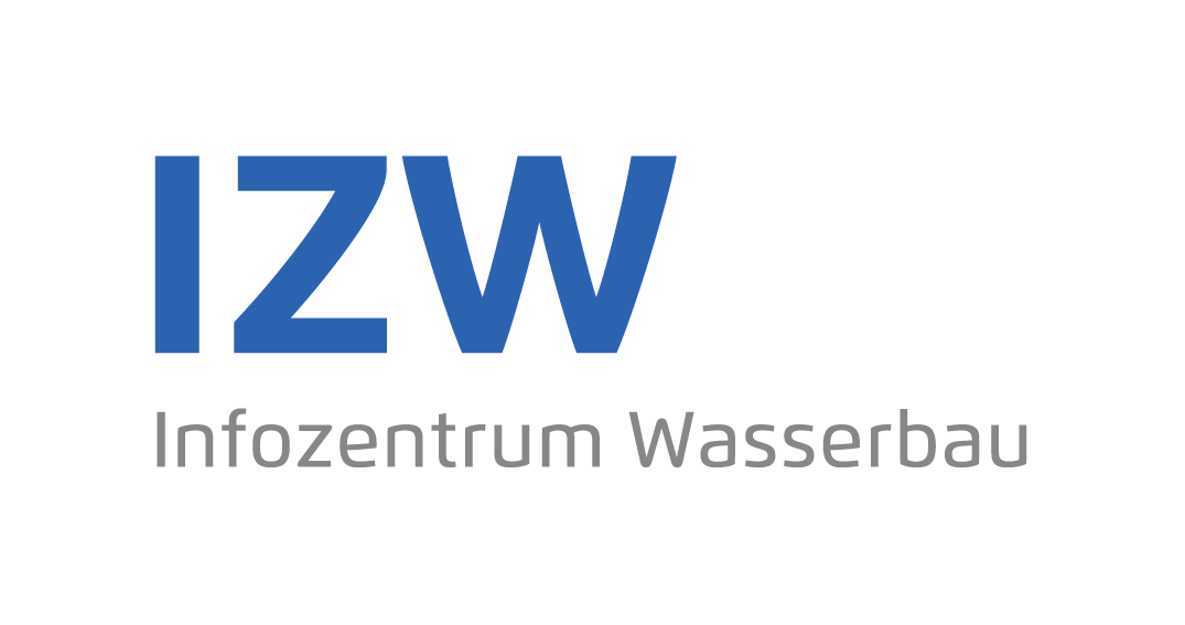 Logo des Infozentrums für Wasserbau